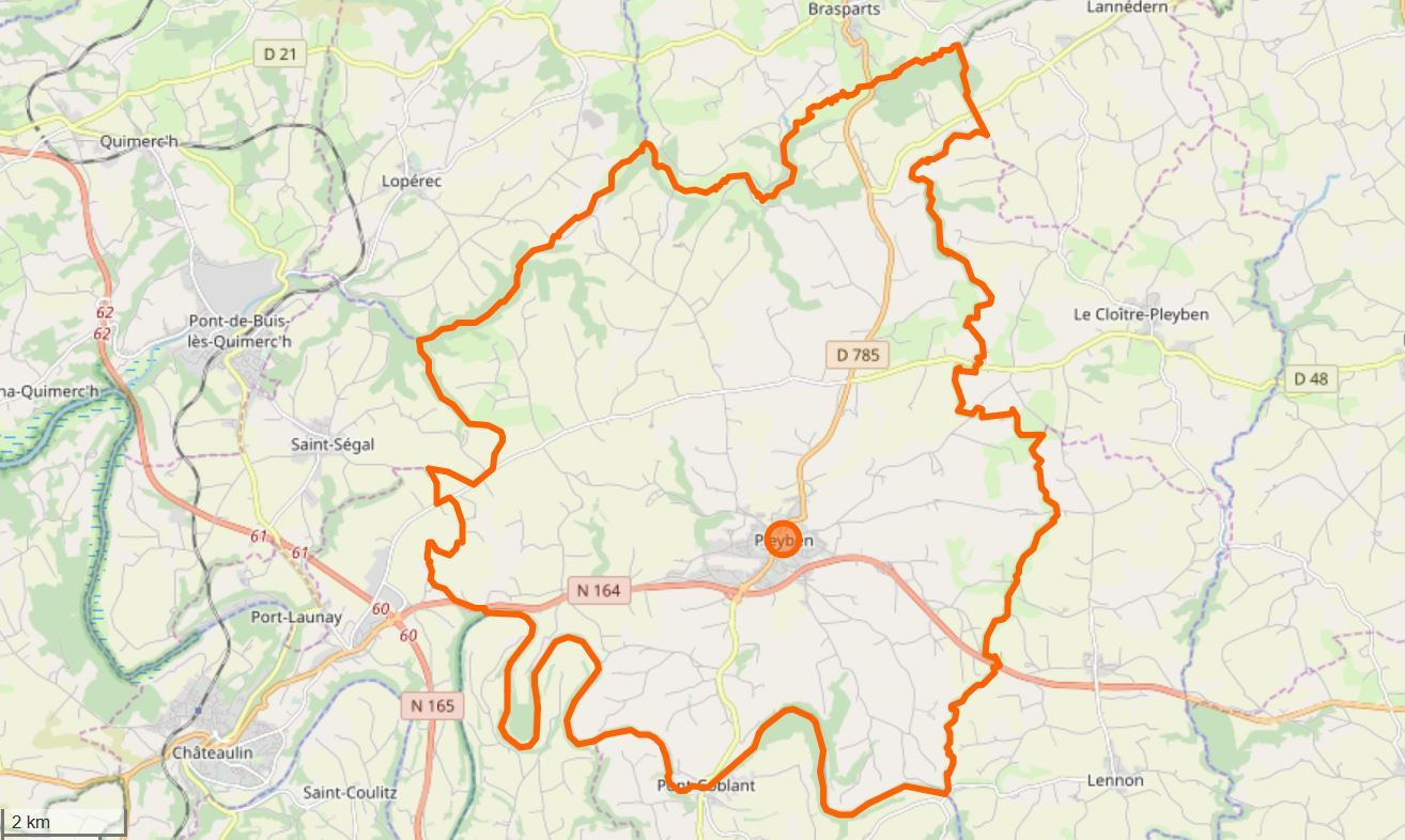 Cette carte a été créée à partir des données du projet Openstreetmap. This map may be incomplete, and may contain errors. Don't rely solely on it for navigation.